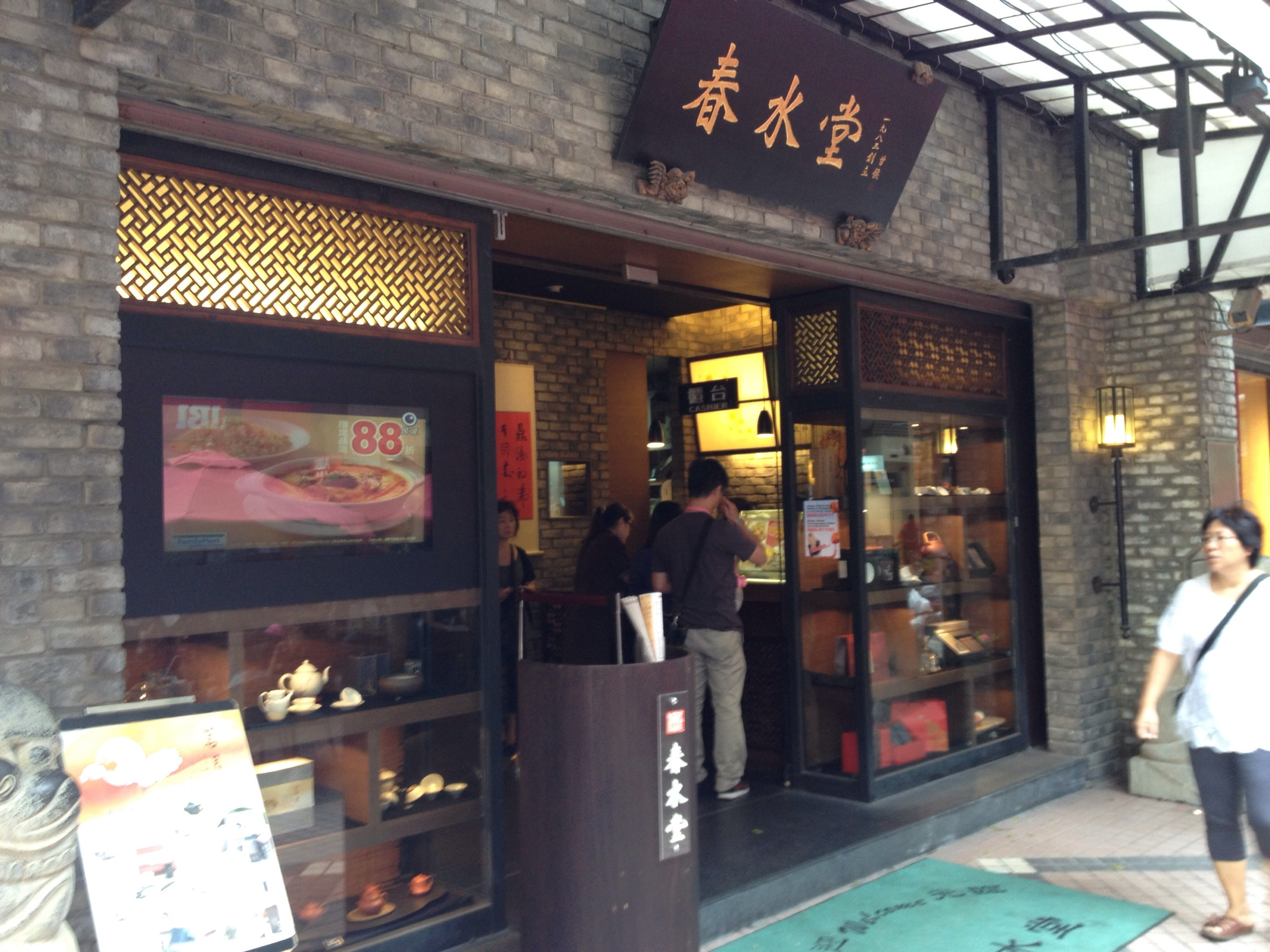 春水堂本店，臺中市西區四維街。